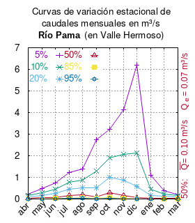 Curvas de variación estacional de río Pama en Valle Hermoso. # Dirección General de Aguas # Diagnóstico y clasificación de los cursos y cuerpos de agua según objetivos de calidad. Cuenca del río Limarí. # Santiago de Chile # Ministerio de Obras Públicas (Chile) # 2004 # url: # urlarchivo: # Tabla 4.14: Río Pama en Valle Hermoso, p.58 mes 5% 10% 20% 50% 85% 95% abr 0.235 0.154 0.092 0.034 0.010 0.005 may 0.470 0.292 0.164 0.055 0.014 0.006 jun 0.753 0.455 0.246 0.077 0.018 0.008 jul 1.223 0.784 0.457 0.161 0.043 0.018 ago 1.388 0.882 0.509 0.178 0.049 0.023 sep 2.737 1.283 0.515 0.096 0.019 0.012 oct 3.210 1.892 0.997 0.293 0.065 0.027 nov 4.145 2.051 0.875 0.172 0.023 0.007 dic 6.195 2.133 0.591 0.058 0.011 0.009 ene 1.094 0.464 0.168 0.030 0.011 0.009 feb 0.400 0.232 0.120 0.034 0.007 0.003 mar 0.195 0.150 0.105 0.045 0.011 0.003 This plot was created with Gnuplot.